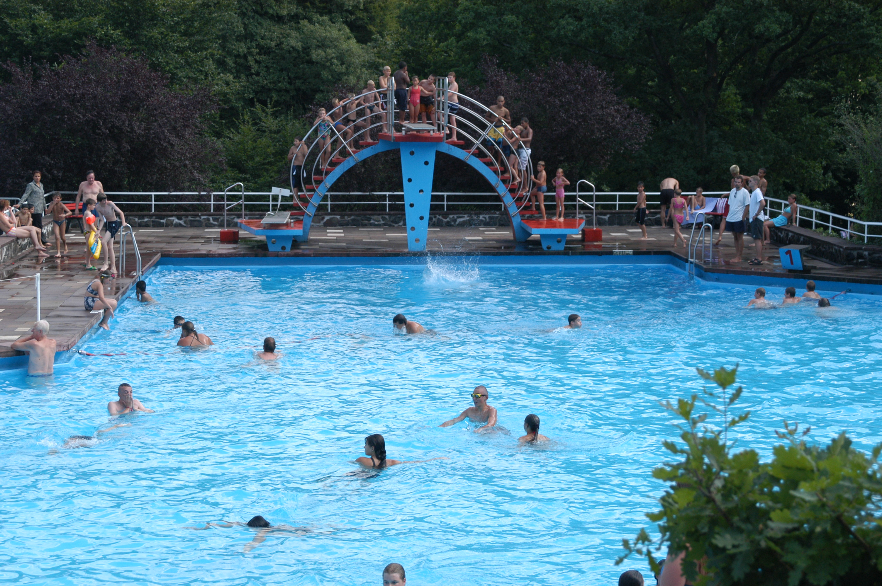 Schwimmbetrieb im Freibad Kammerwoog